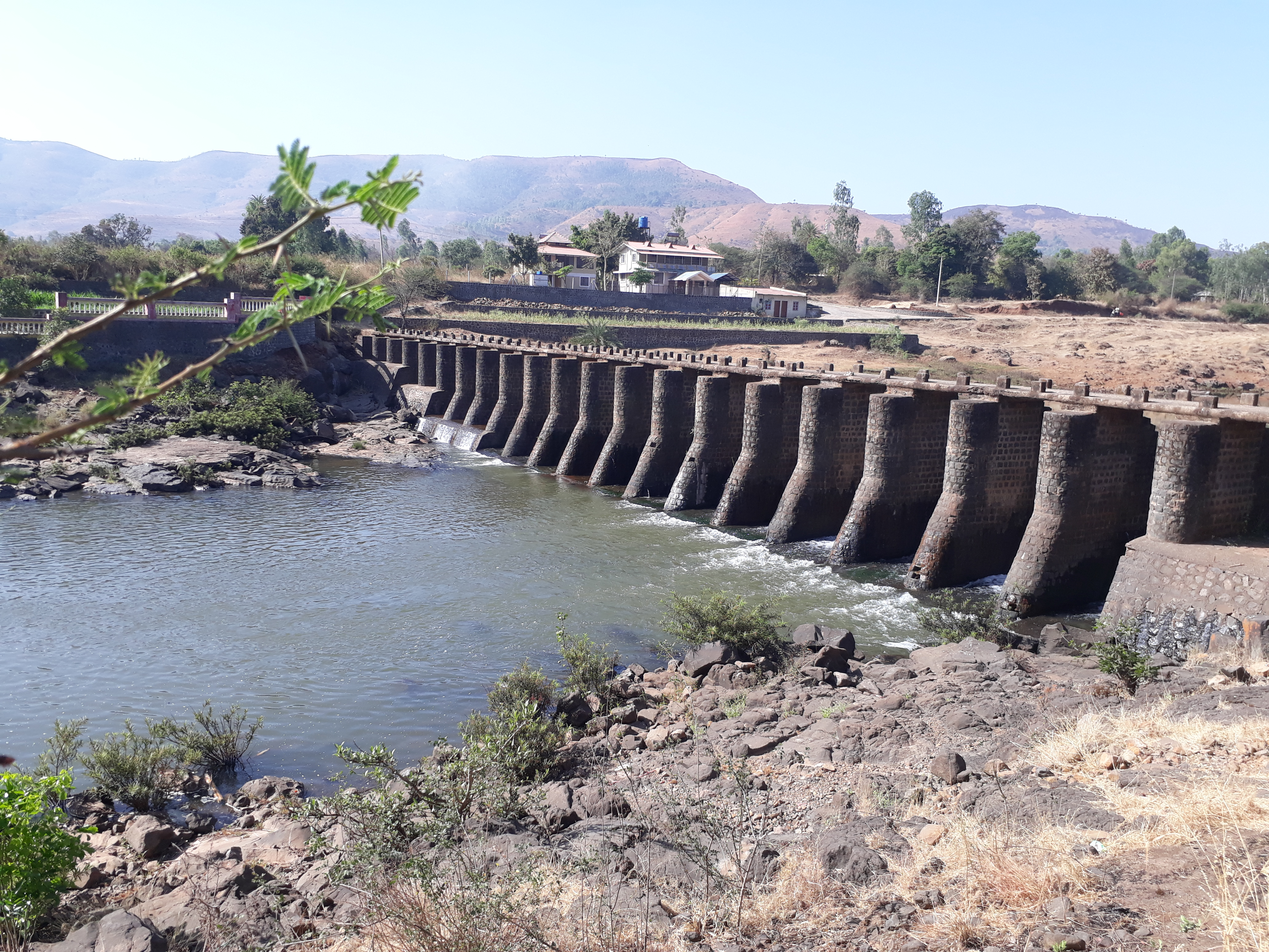 कोल्हापूरी बंधारा (करंजावणे गाव)